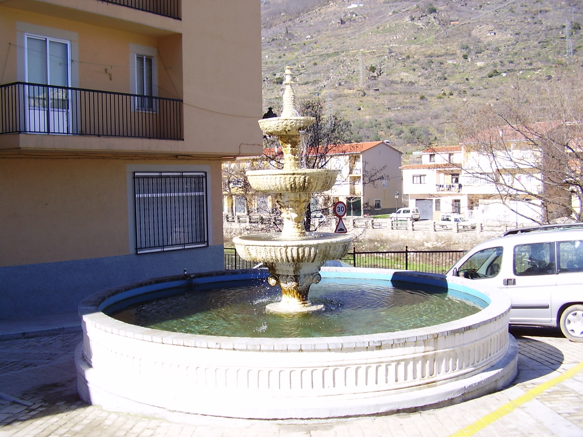 Fuente en Navaconcejo, provincia de Cáceres, España.